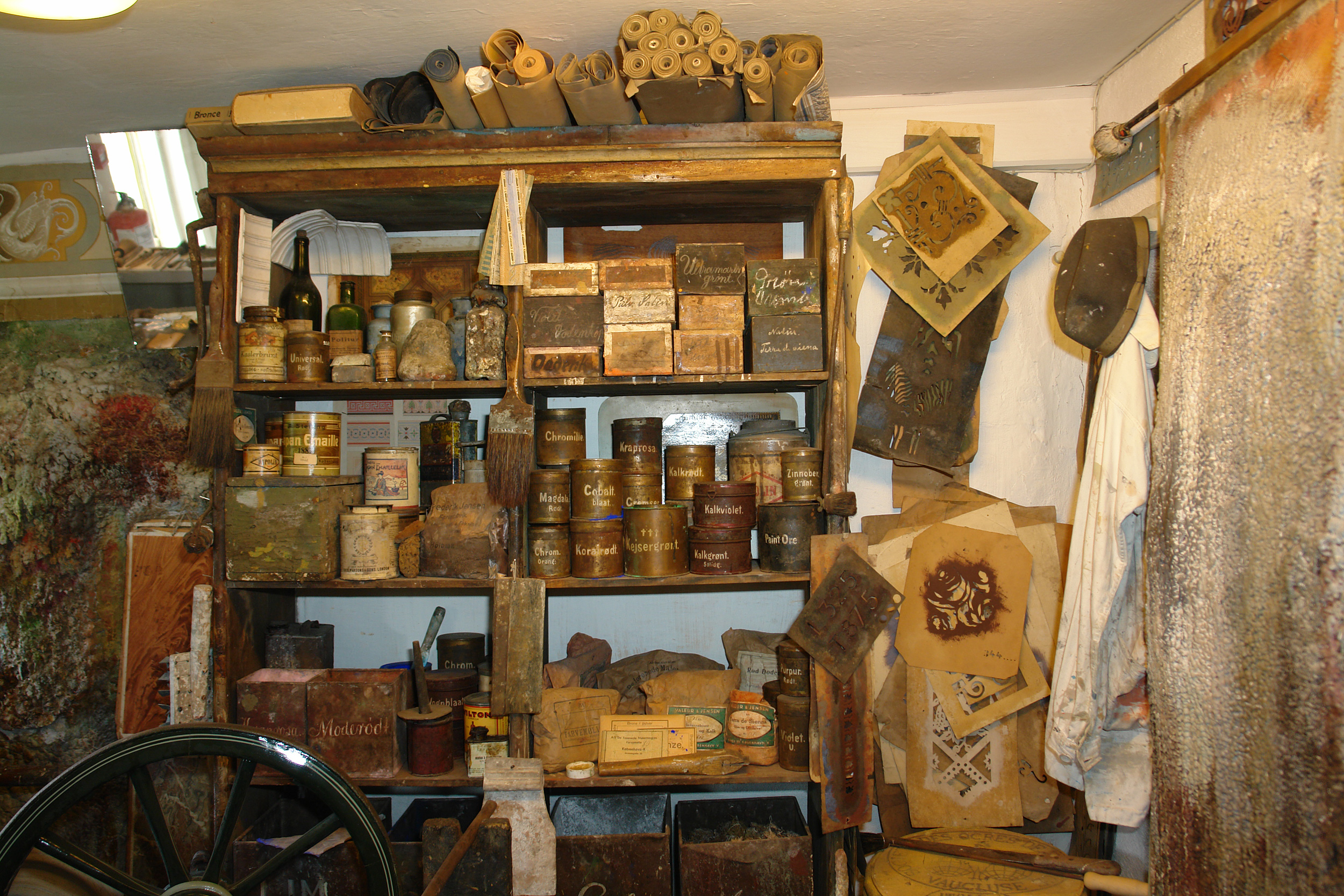 Holbæk Museum: Klosterstræde 12, Malerwerkstatt um 1900